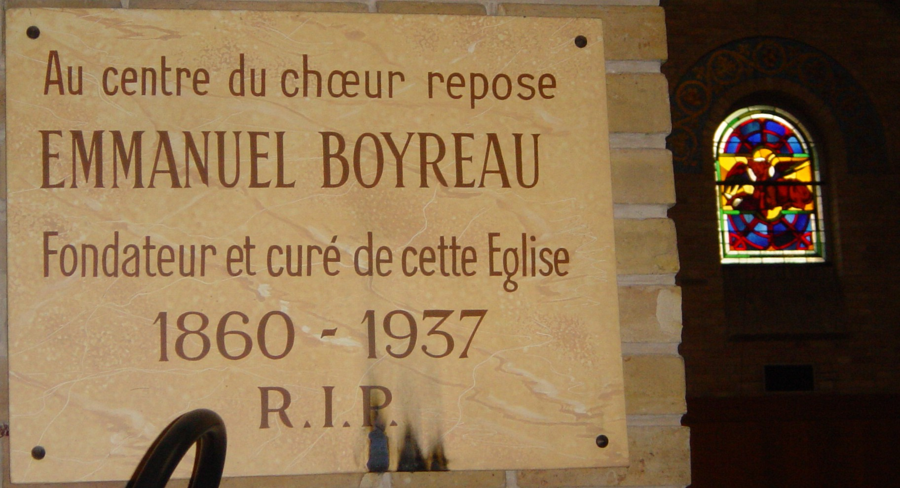 Plaque dans la l'église Notre Dame du Rosaire (Paris XIVème, France). Inscription : "Au centre du coeur repose Emmanuel BOYREAU, fondateur et curé de cette Eglise, 1860-1937".